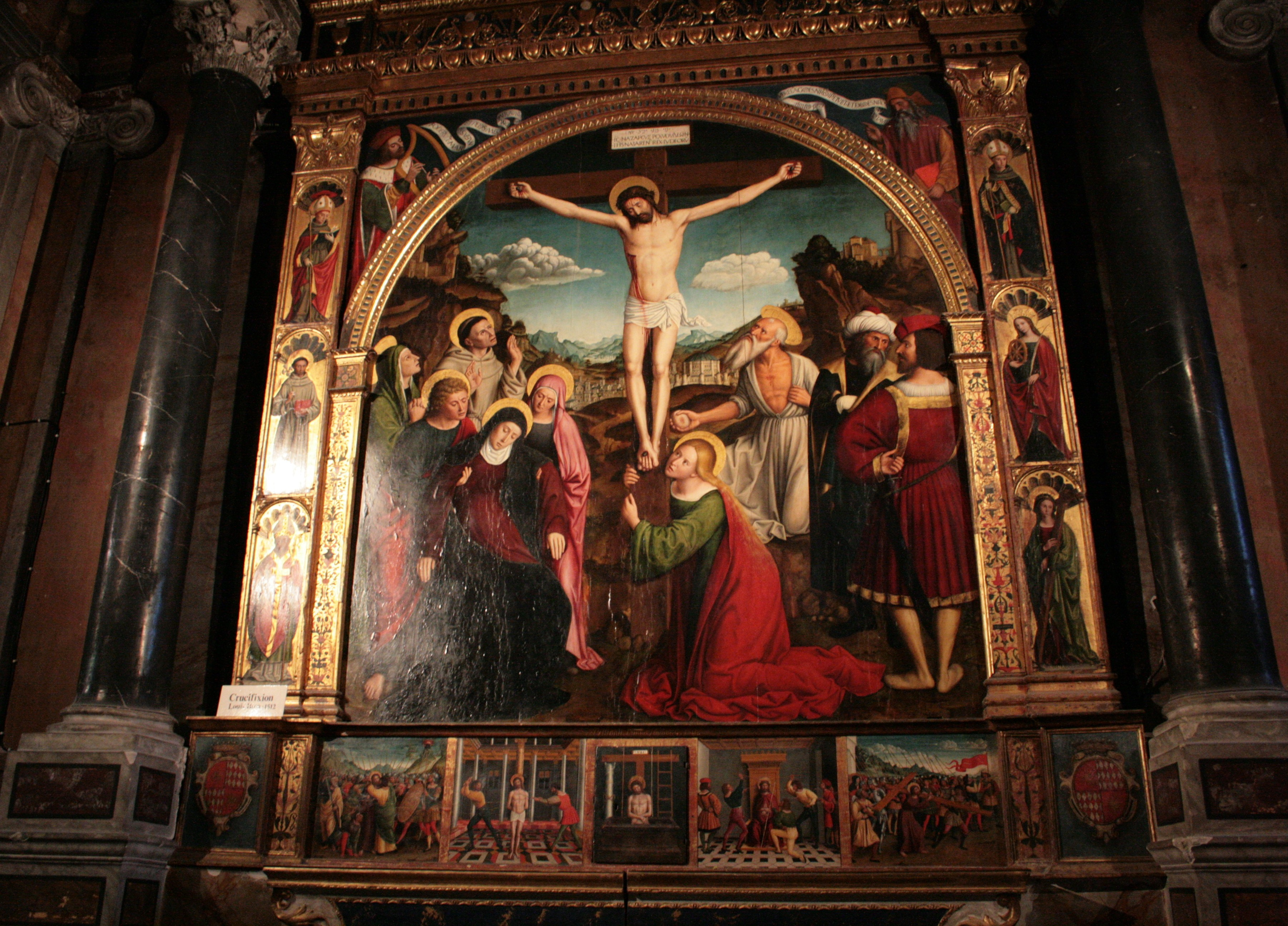 Monastère des Franciscains, Nice (France, Alpes-Maritimes, colline de Cimiez).